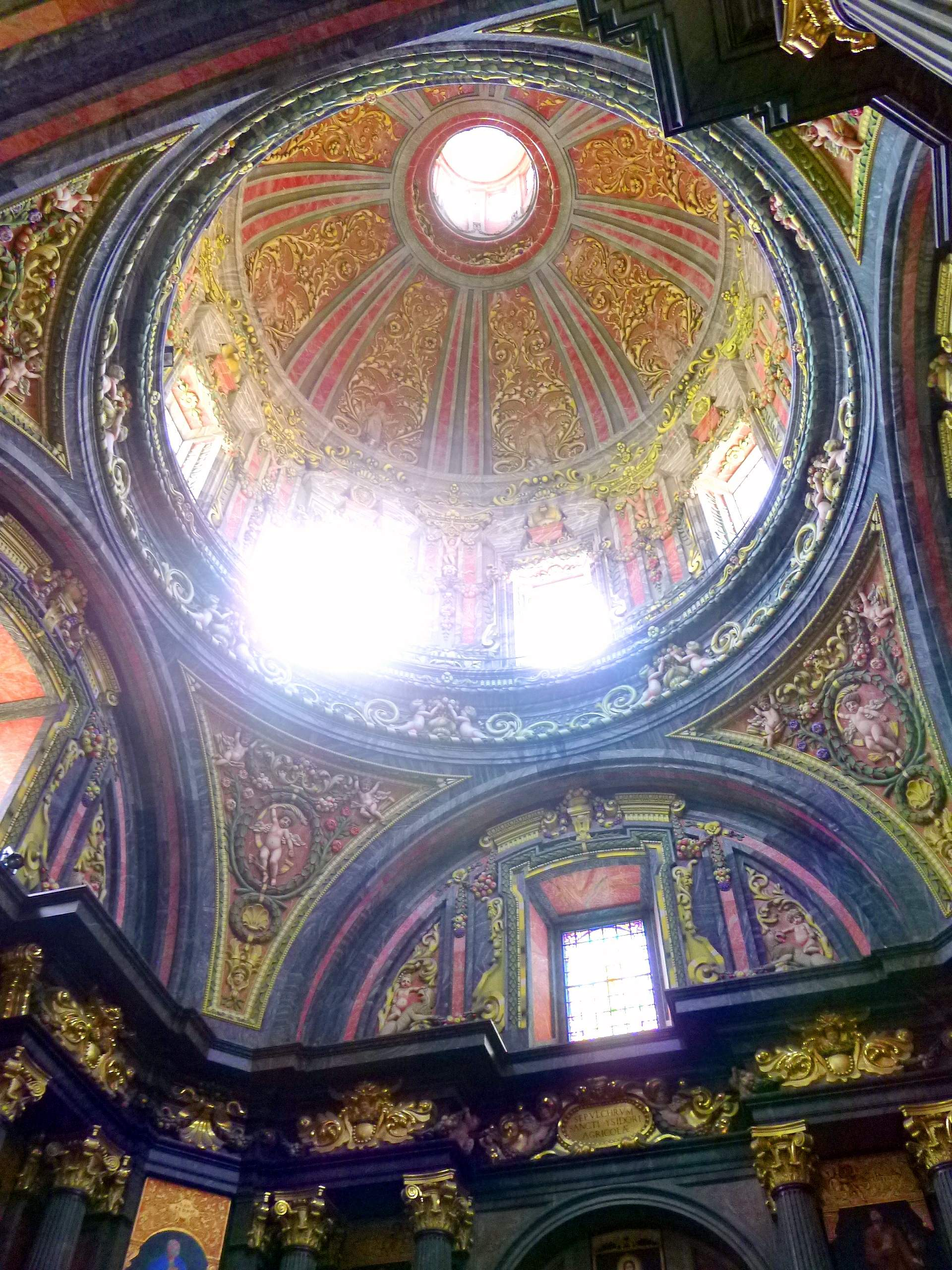 Iglesia de San Andrés (Madrid)